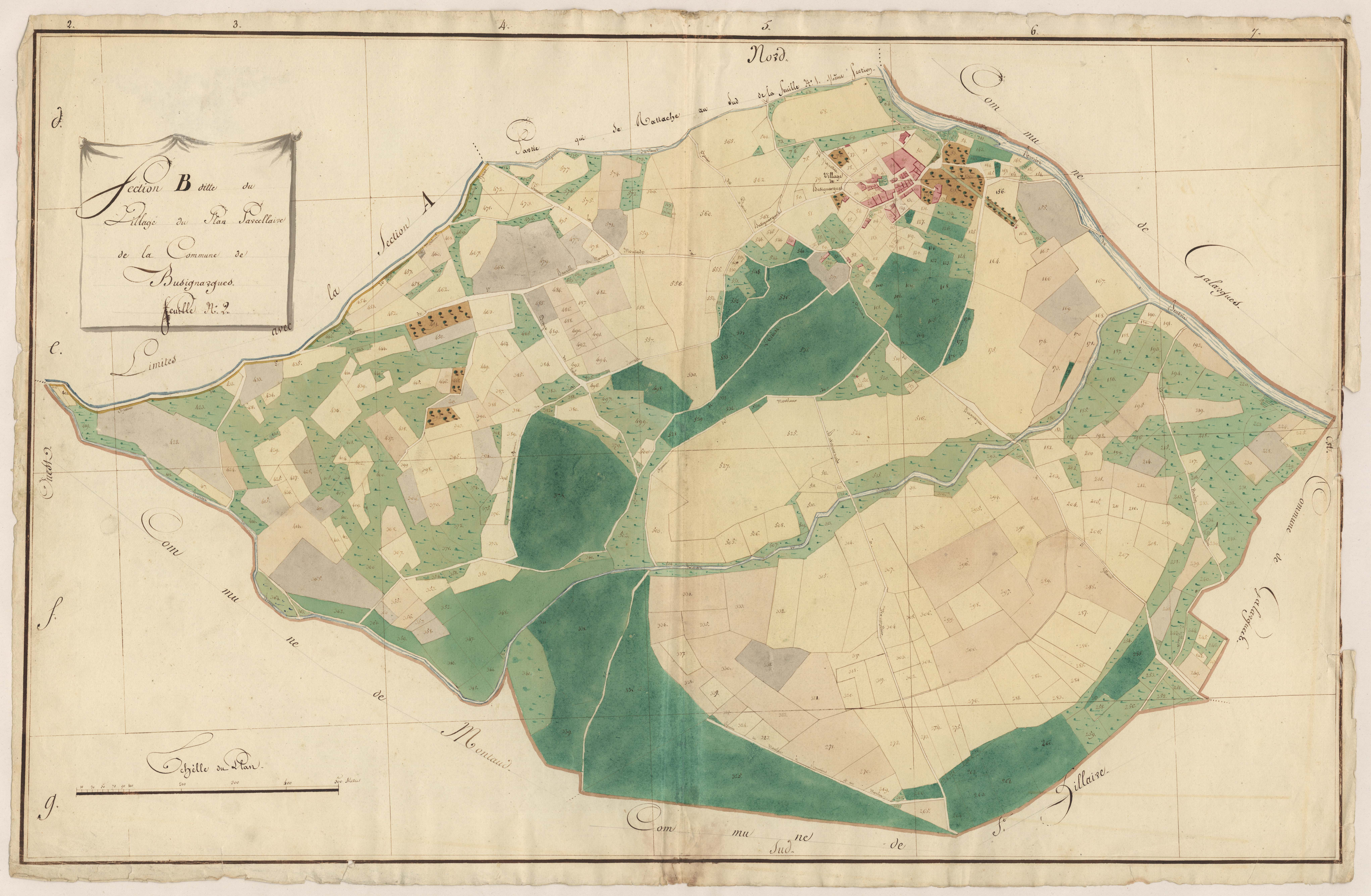 Buzignargues. - Cadastre napoléonien : plan de la section B2 du Village